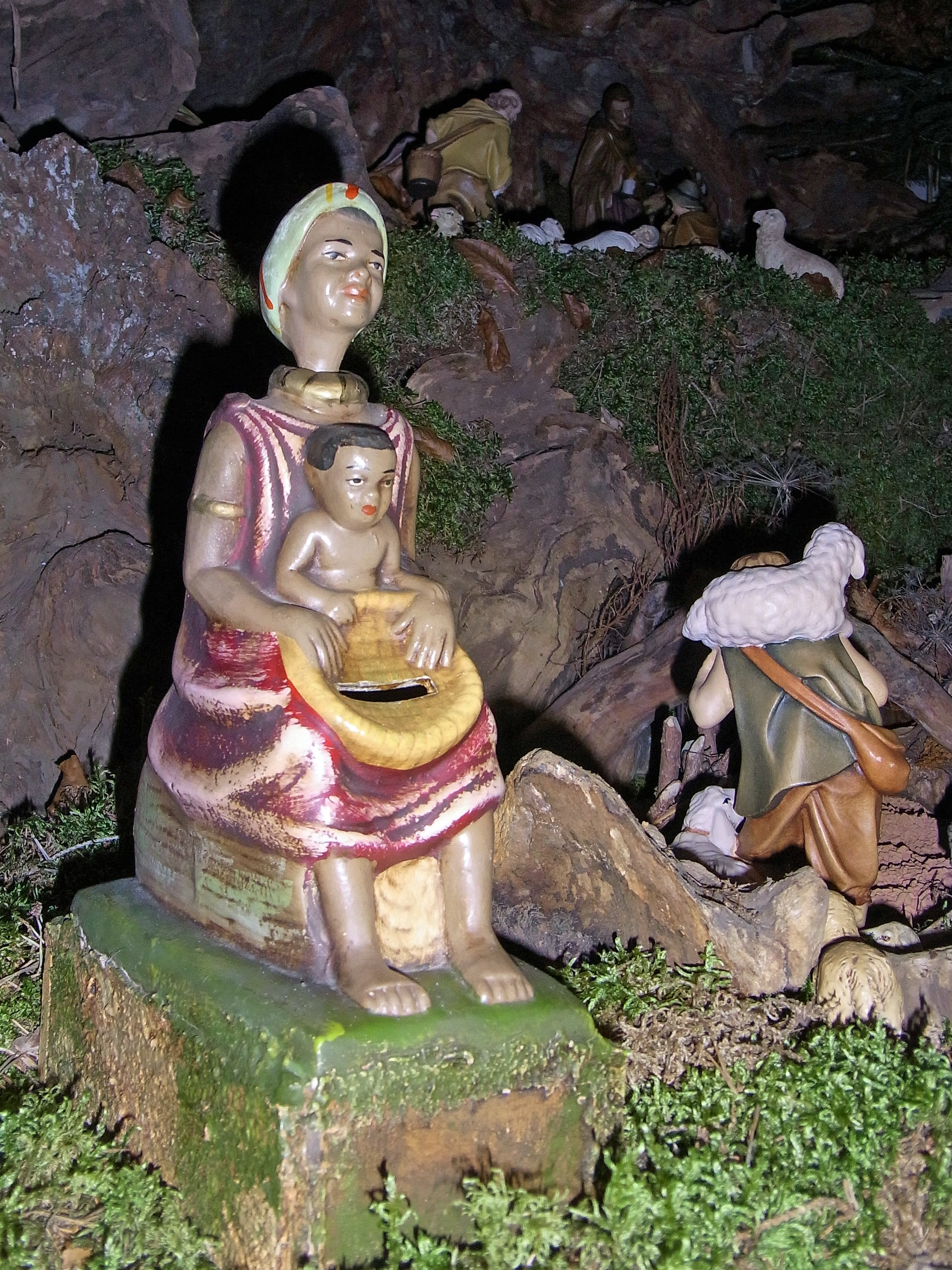 „Nickneger“ an der Krippe von St. Johannes Baptist in Rottenburg-Hemmendorf